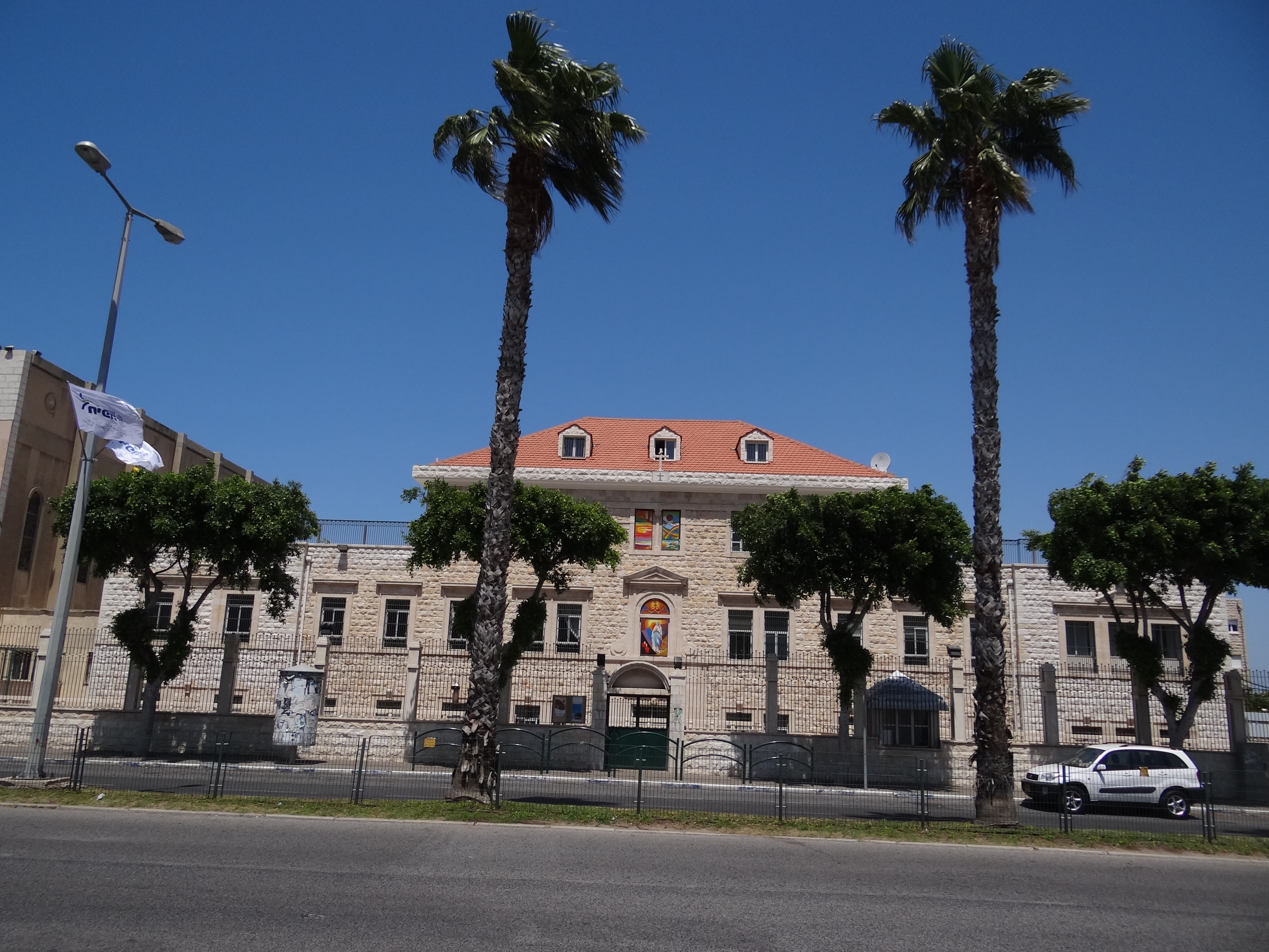 Saint Joseph's Latin Parish, Haifa Israel مدرسة الكرمل الثانوية في حيفا، بجانب كنيسة مار يوسف للاتين סיינט גוזף, הכנסייה הלטינית, שוכנת בחיפה בשדרות המגינים. מבני הקהילה כוללים ברת בית הספר כרמל בשדרות המגינים 76, מבנה הכנסייה בשדרות המגינים 78, ומבנה הקהילה בשדרות המגינים 80 בית ספר כרמל